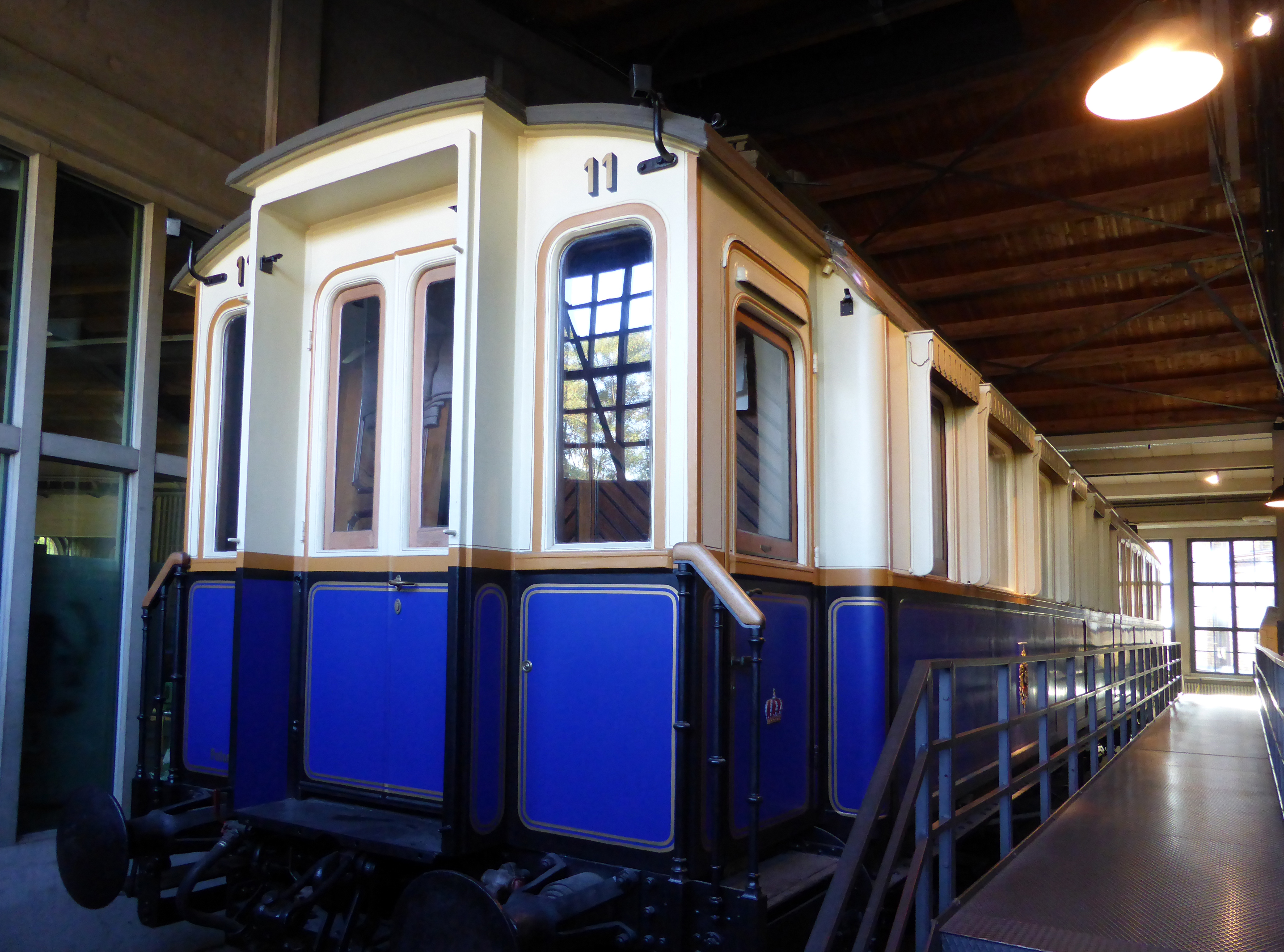 Hofzug Kaiser Wilhelms II., Baujahr 1888. Breslauer Aktiengesellschaft für Eisenbahnwagenbau. Ausgestellt im Deutschen Technikmuseum in Berlin. Wikipedianische KulTour am 10. Oktober 2015 in der Ausstellung des Museums.